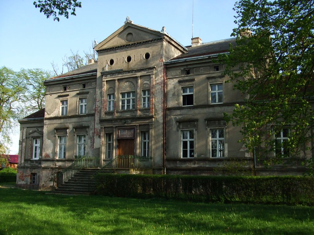 pałac w Dąbrówce Małej